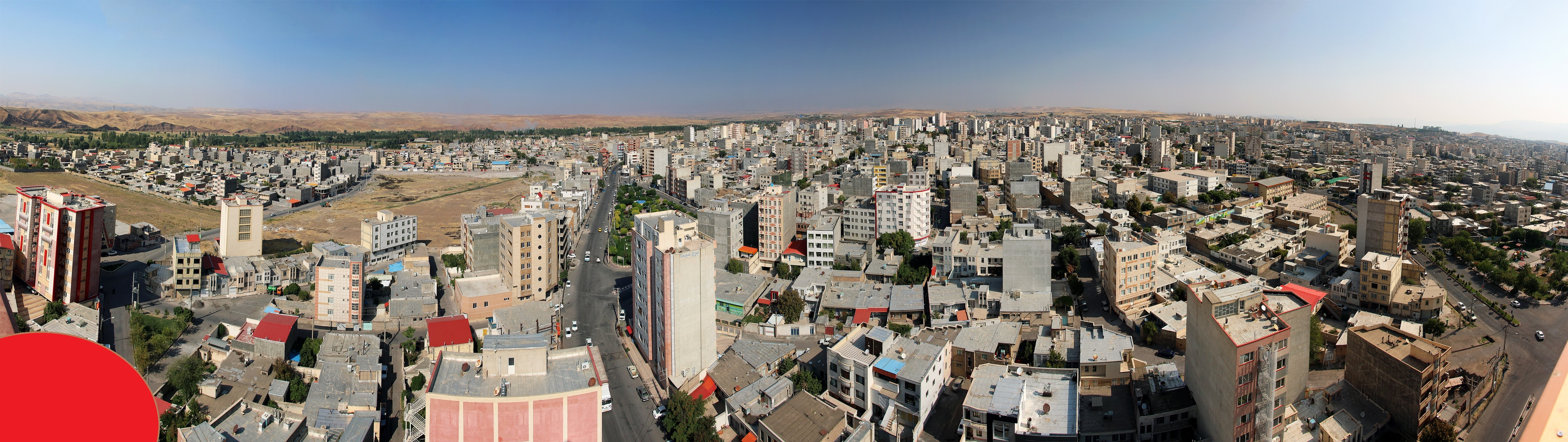 نمای شهری از میانه